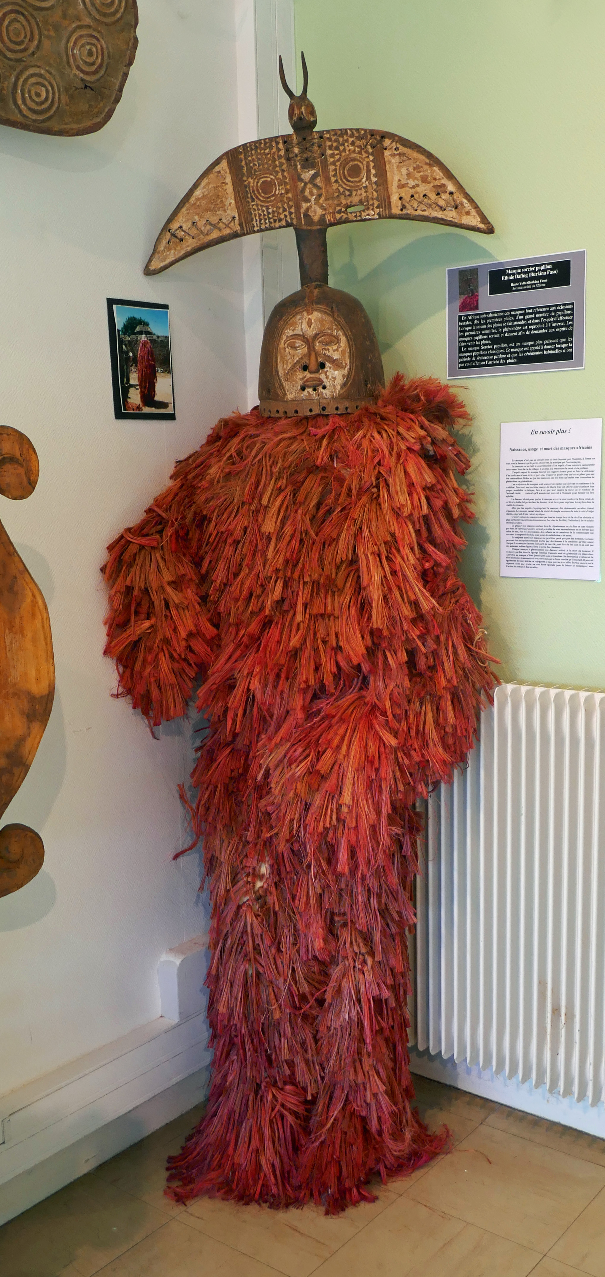 Masque sorcier papillon, Dafing, HauteVolta (Burkina Faso), seconde moitié du XXe siècle. Collection particulière.